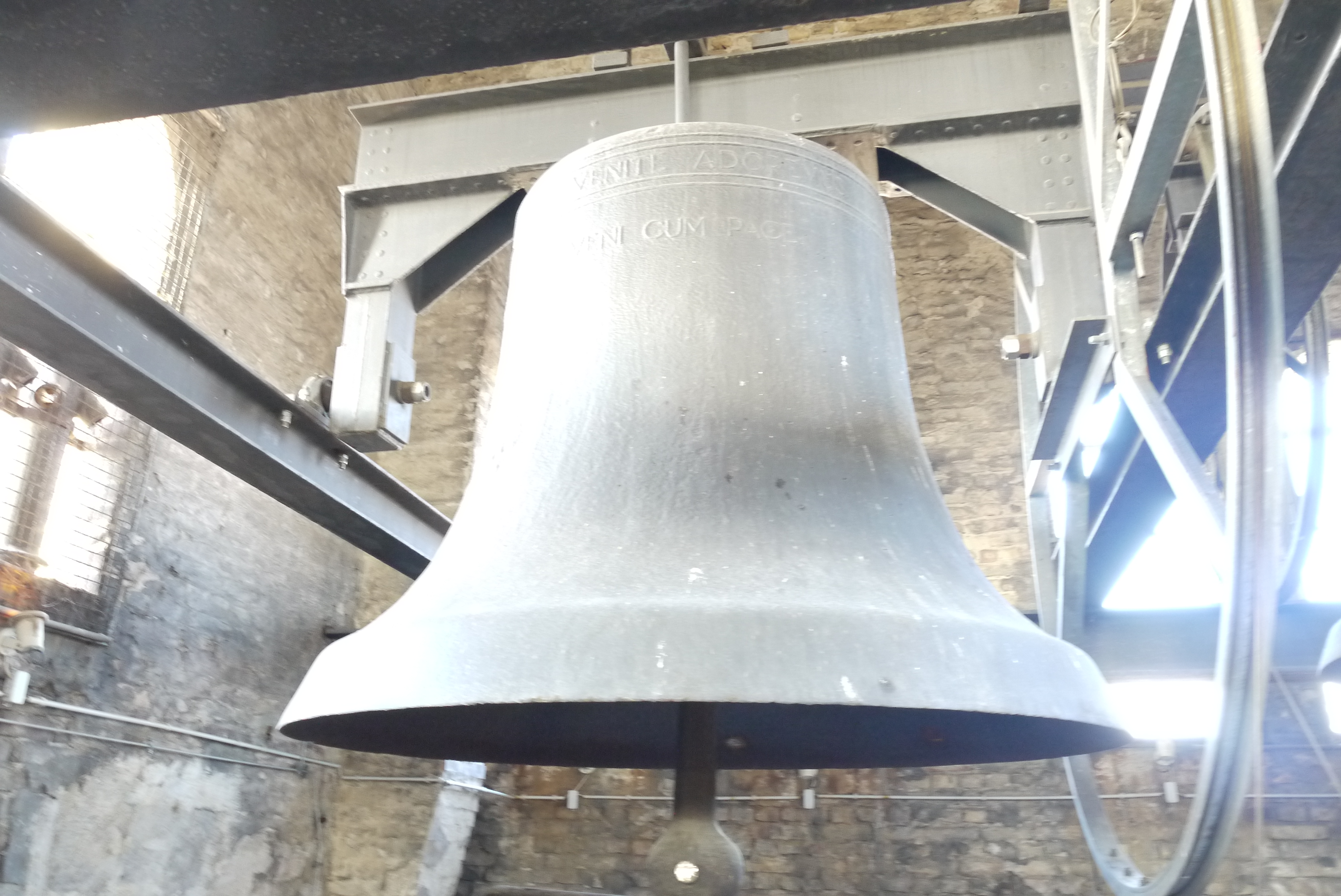 Die Glocke 1 der katholischen Pfarrkirche "Heilige Familie" in Berlin-Prenzlauer Berg